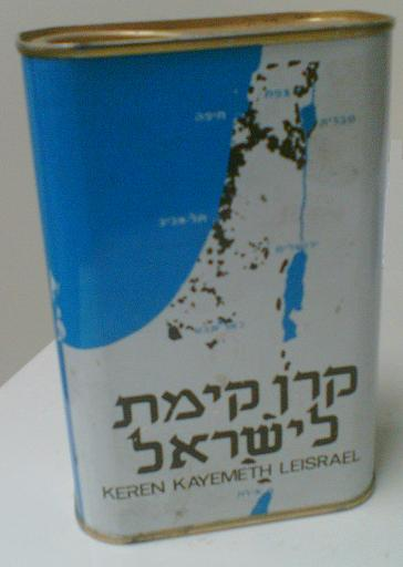 הקופסה הכחולה של הקרן הקיימת לישראל. צילם דוד שי